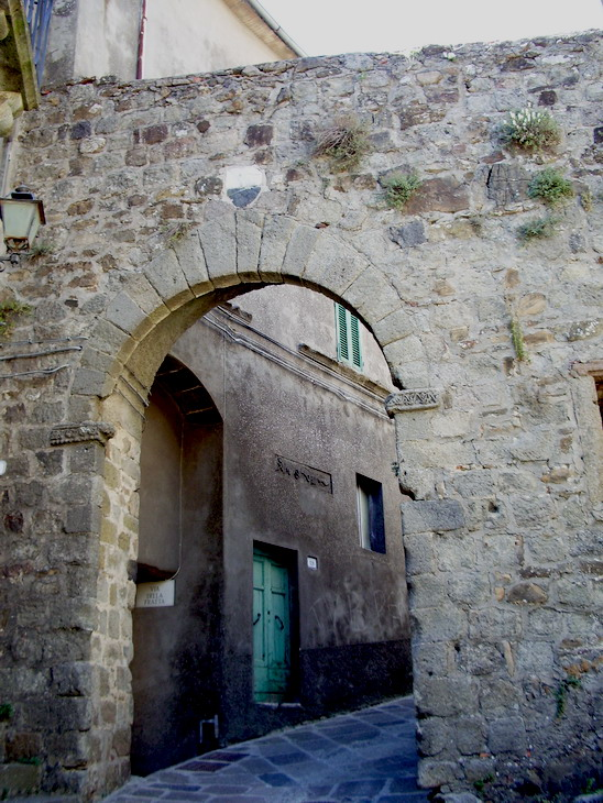 La Porta Talassese ad Arcidosso (GR)